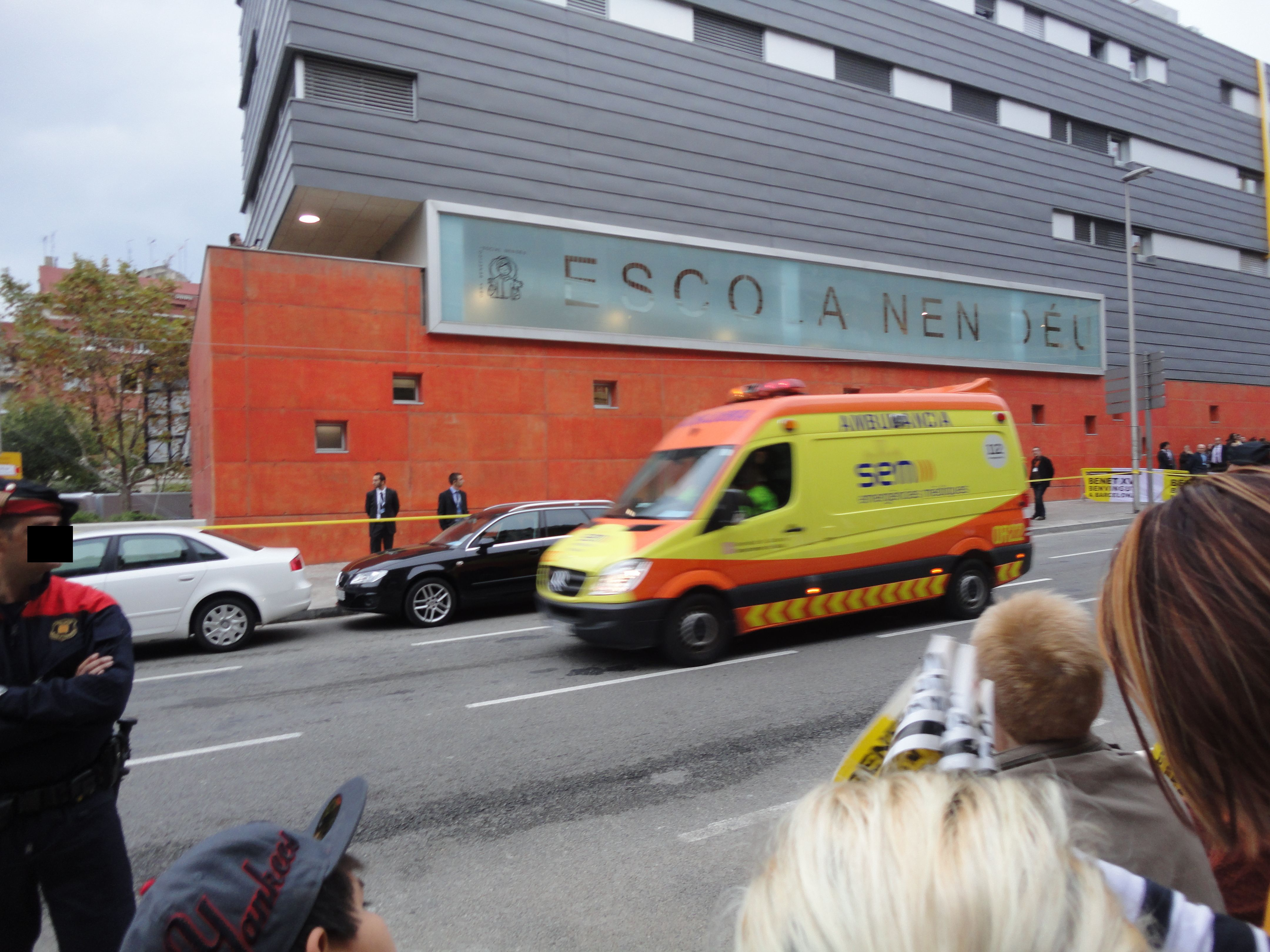 SEM Barcelona.